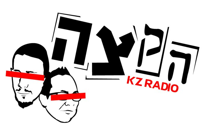 הלוגו של העצומה להשארת "הקצה" במתכונת מורחבת בגלגלצ